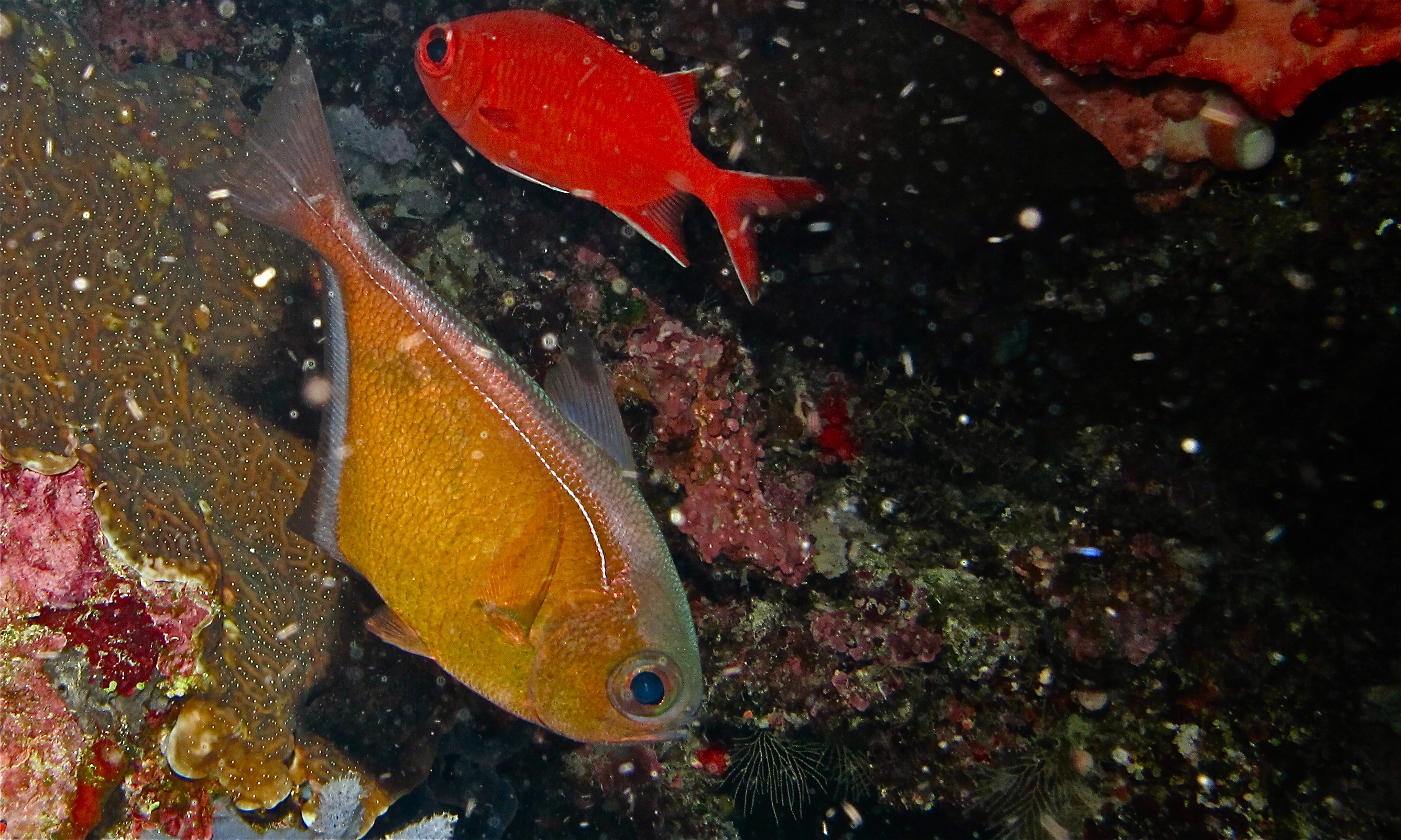 Mandoline, Bunaken Island, Sulawesi, INDONESIA